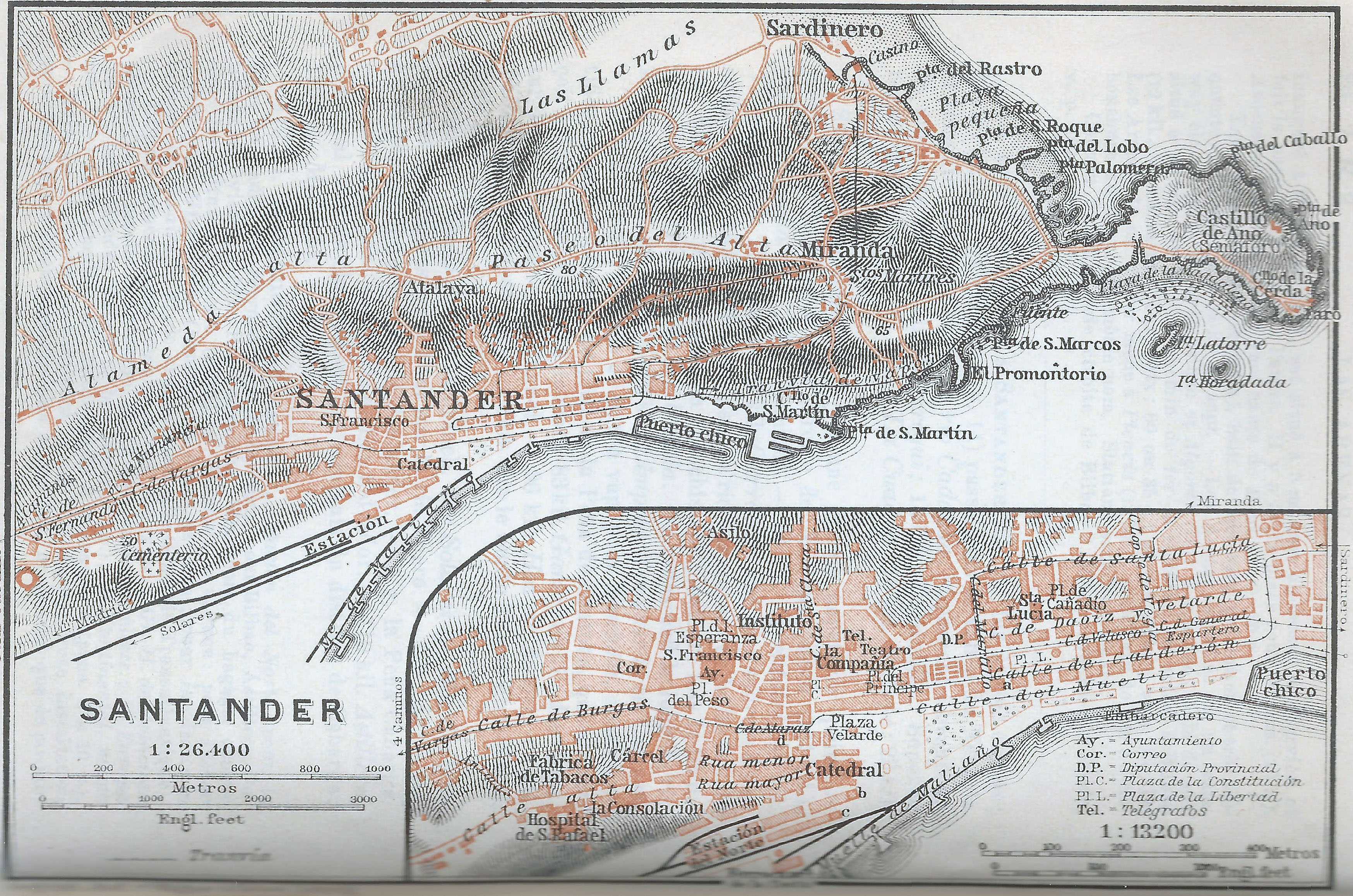 1908 Baedeker map of Santander.